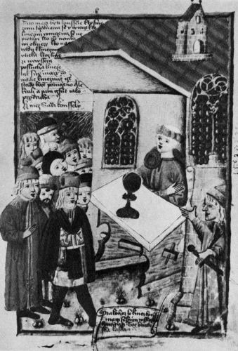 Přijímání pod obojí způsobou